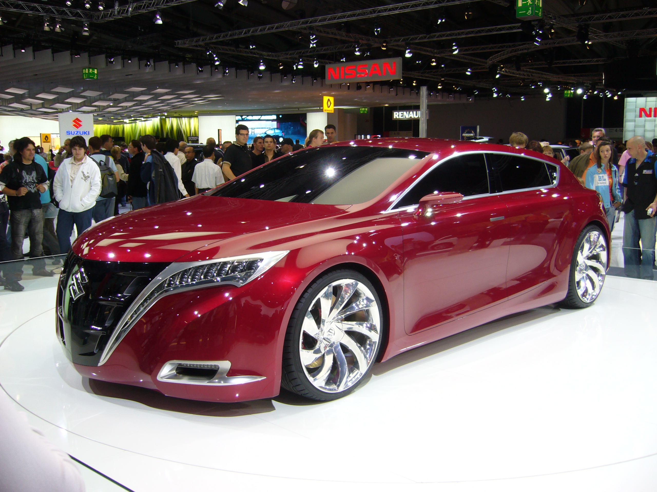 Suzuki Concept Kizashi